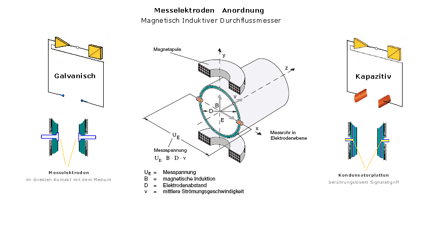 Elektroden-Anordnung einer magnetisch induktiven Durchflussmessung